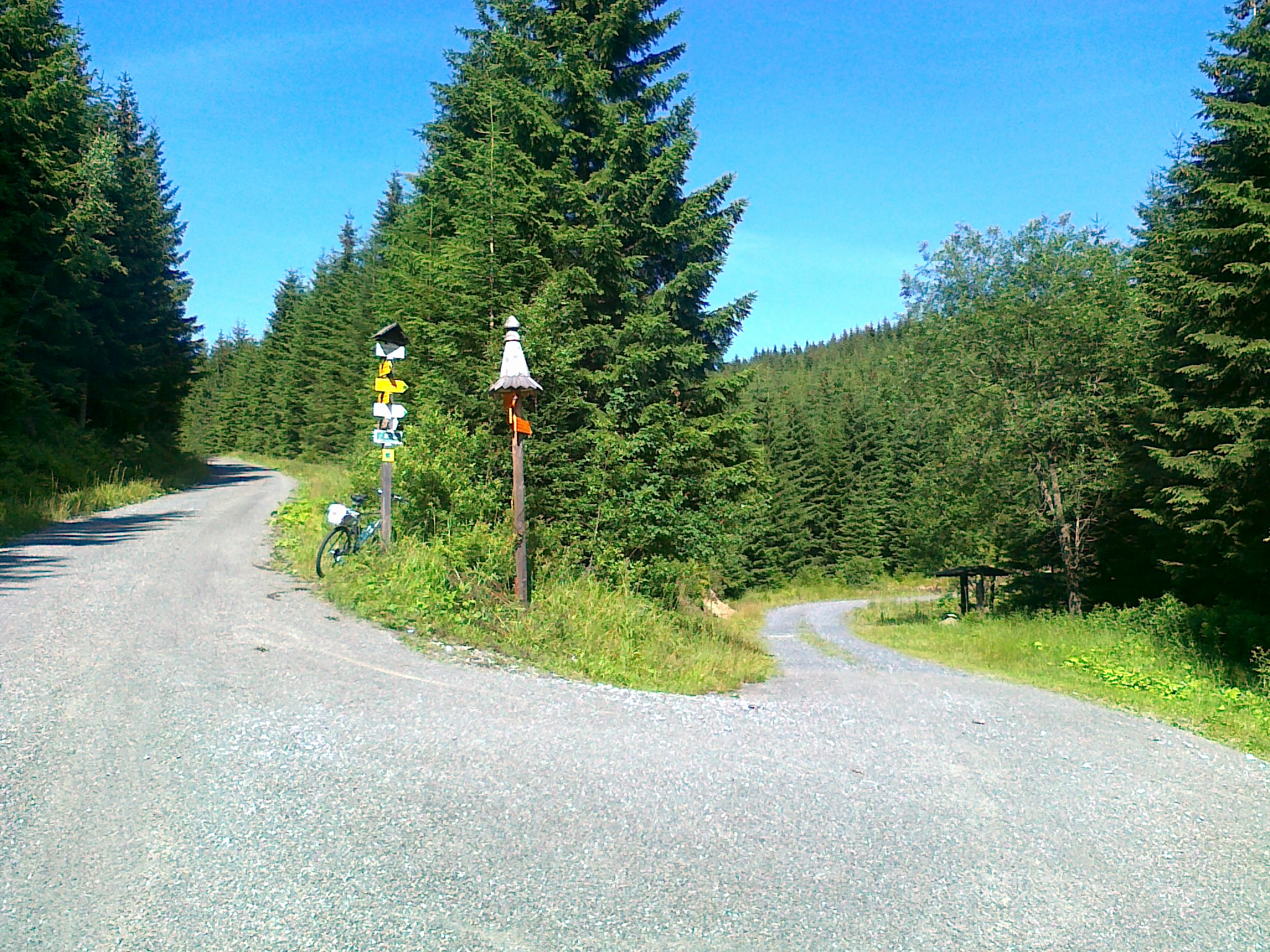 Miejsce o nazwie Pod Velkým Bradlem - 985 m na skrzyżowaniu szlaków